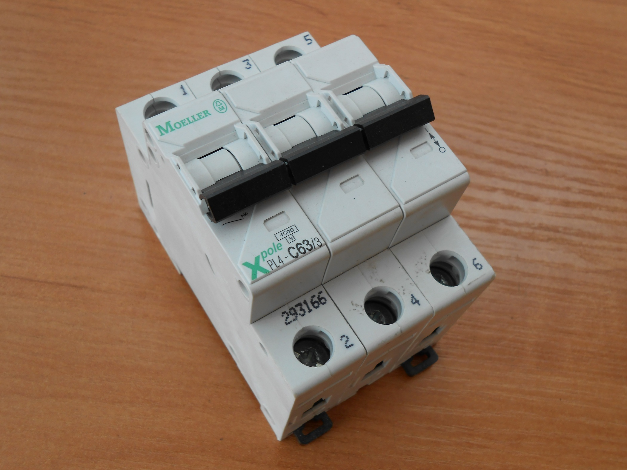 Moeller (трёхфазный автомат) Taken with Nikon Coolpix S2700